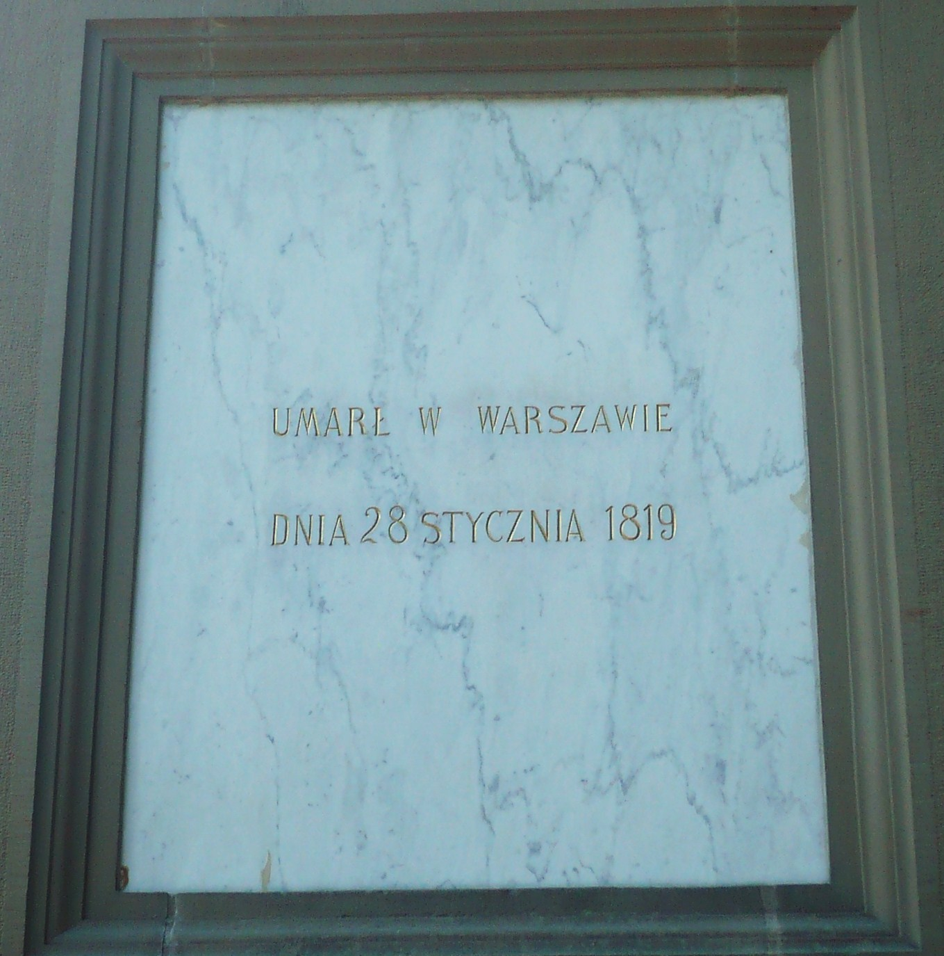 Lwów. Pomnik Kilińskiego